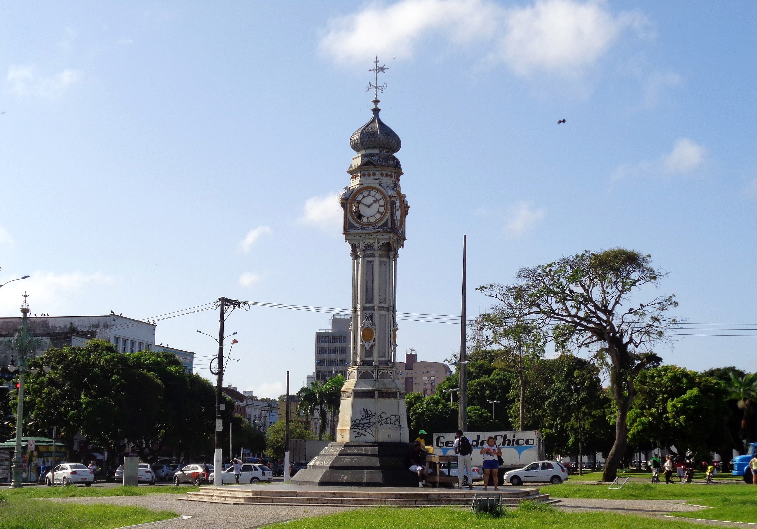 Praça Siqueira Campos,conhecida popularmente como Praça do Relógio.